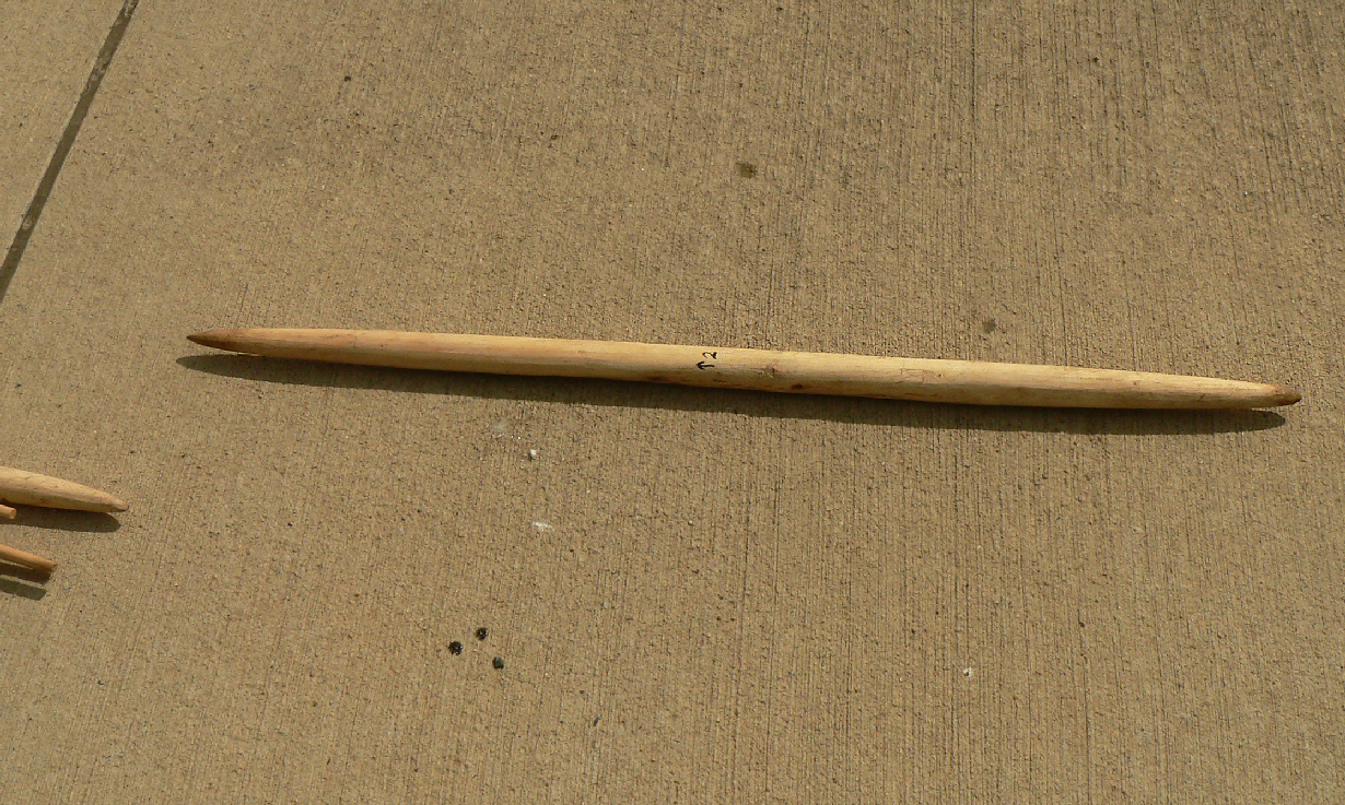 (Nachbau eines Wurfstocks durch die Archäologen)